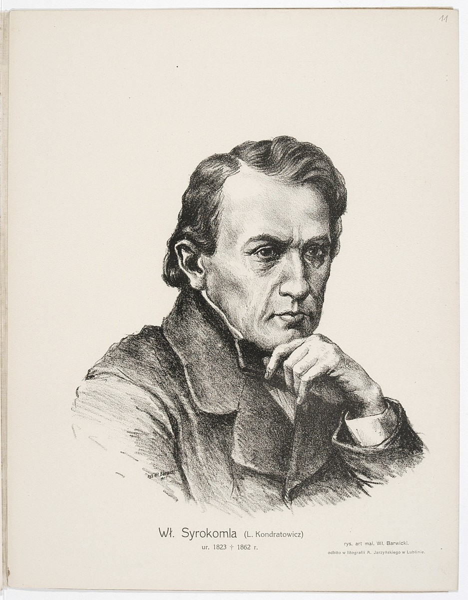 Władysław Syrokomla from CBN Polona